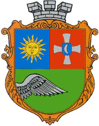 Герб города Гайсин